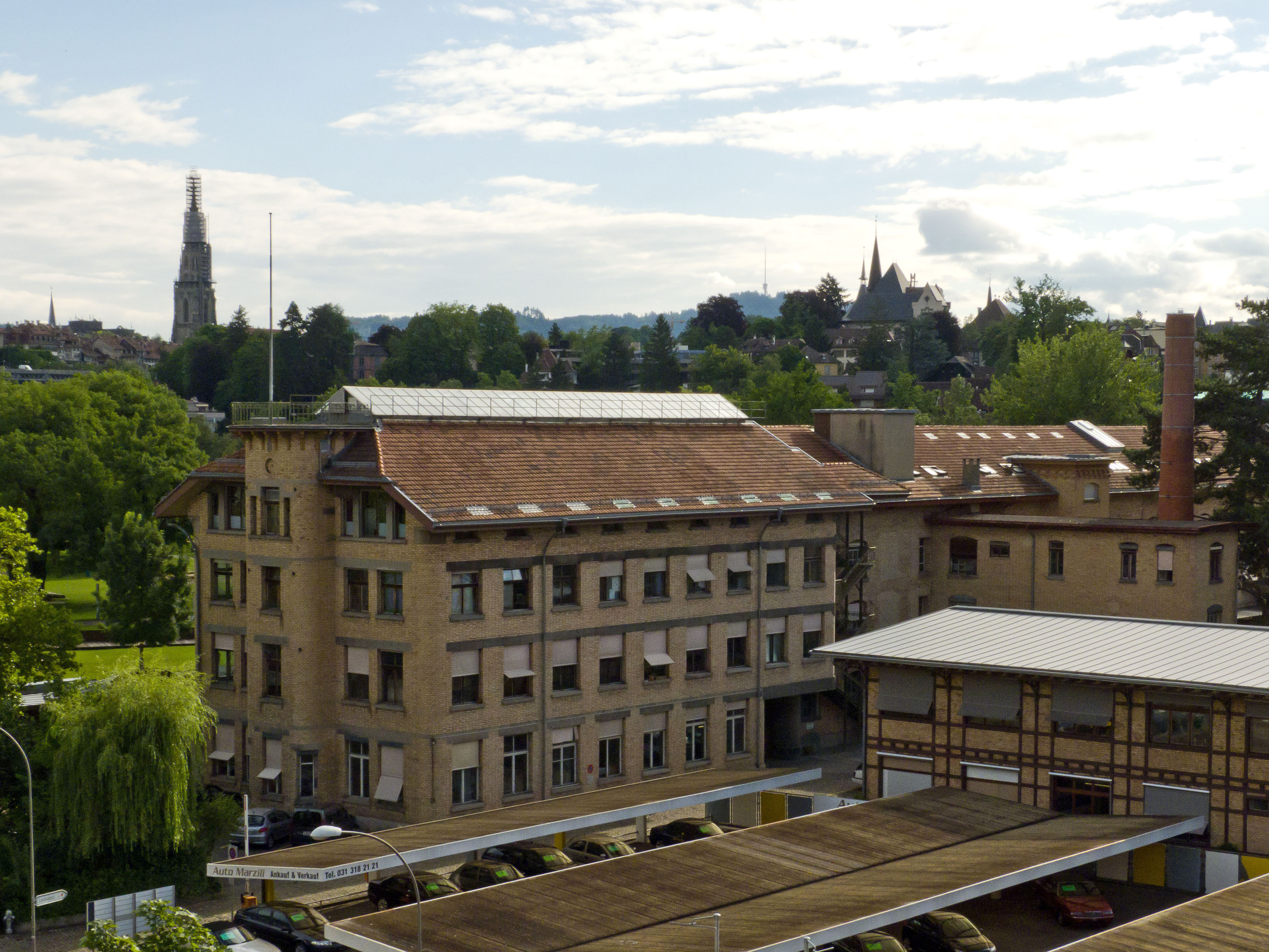 Die ehemalige Ryff Fabrik, daselbst Filmhaus und Lichtspiel.